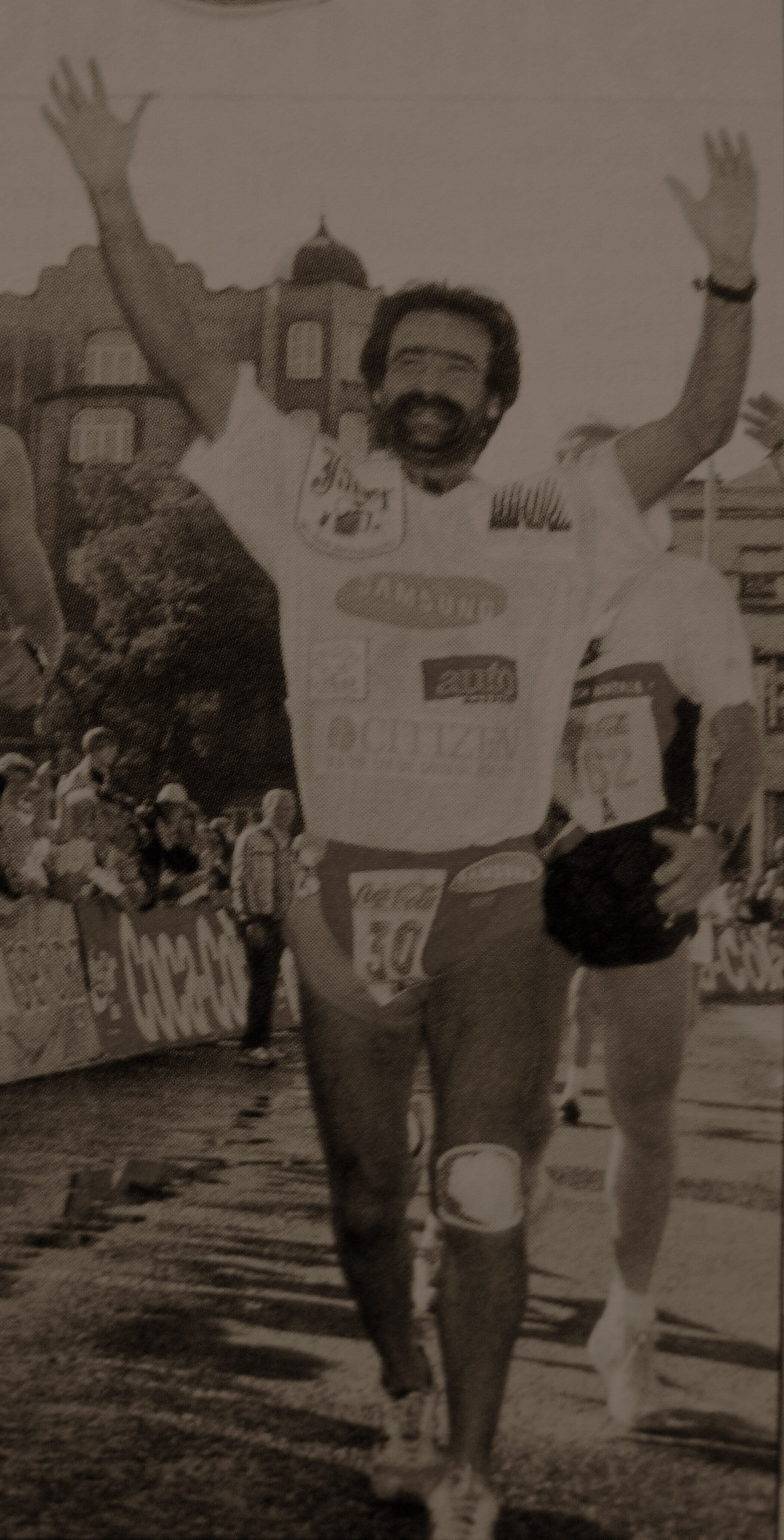 Kis-Király Ernő harmadik alkalommal nyerte a 340 km-es Bécs–Budapest szupermaratont 1993-ban